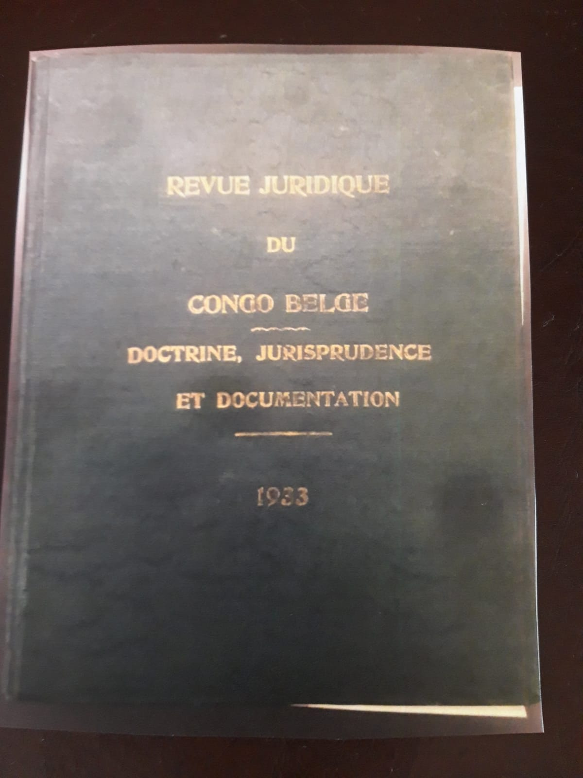 Revue juridique du Congo datant de 1923.